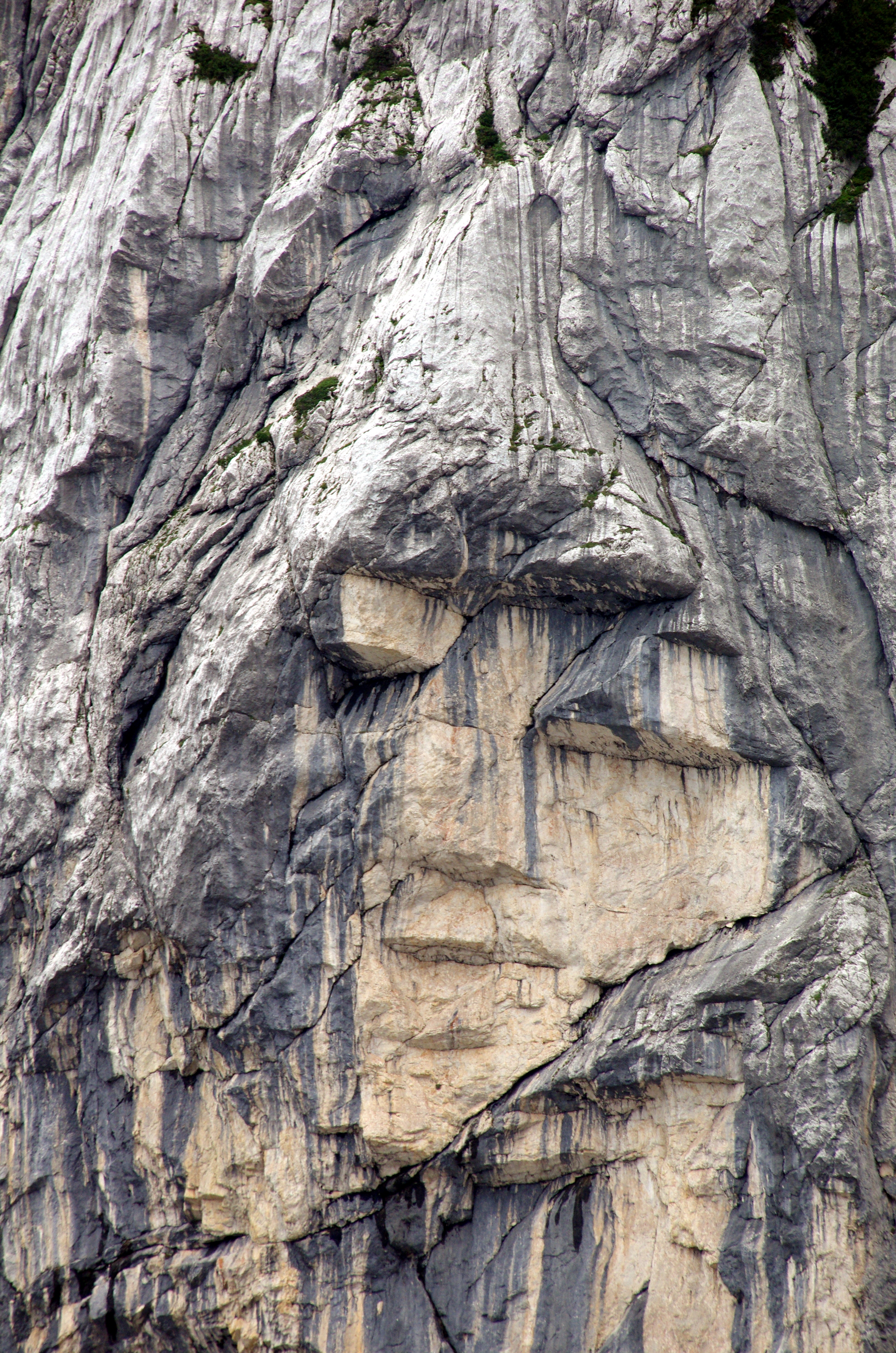 Der offizielle Name dieser Felsformation in der Nähe des Vršičpass (Slowenien), in der man ein Gesicht erkennen kann, lautet "Pagan Girl" oder "Heidnisches Mädchen". Ich musste allerdings eher daran denken, dass Han Solo offensichtlich eine Brille trug, als er in Kryptonit eingefroren wurde. Ich finde eine Brille ist doch überdeutlich zu erkennen, ein Mädchen eher weniger.